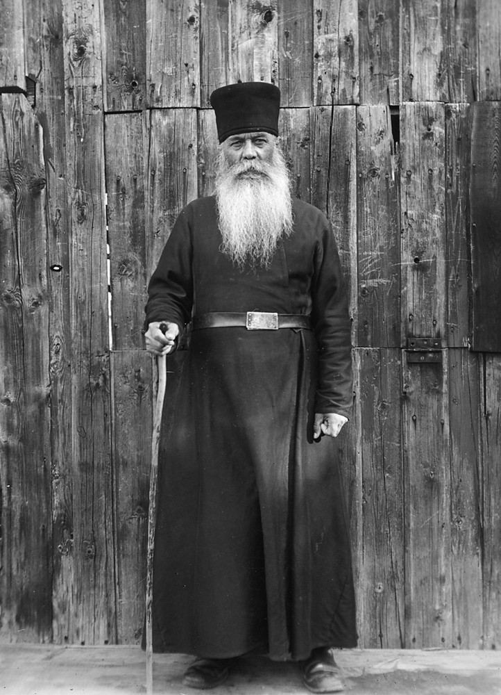 Насельник Валаамского монастыря иеромонах Владимир